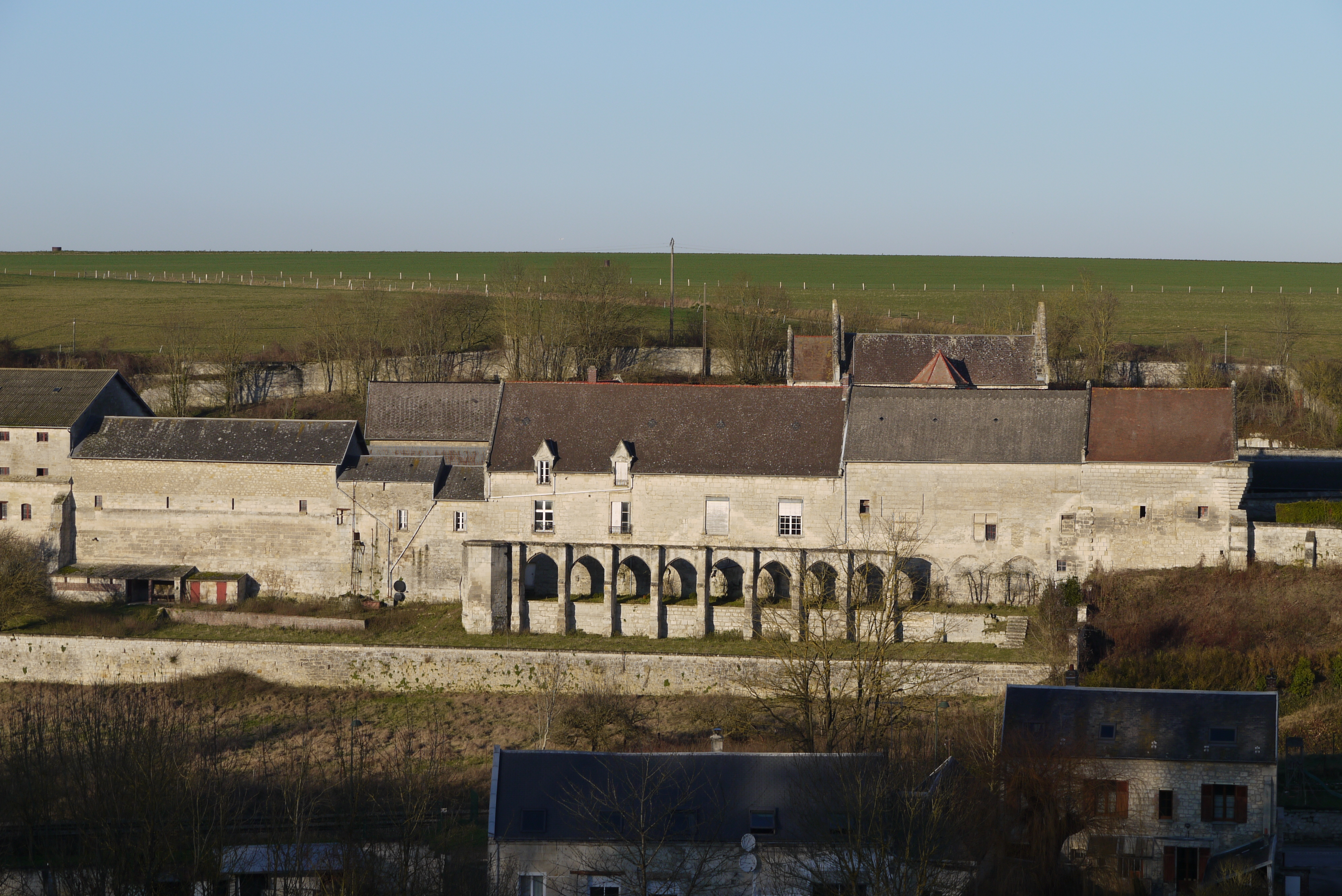 Vue générale de Vierzy